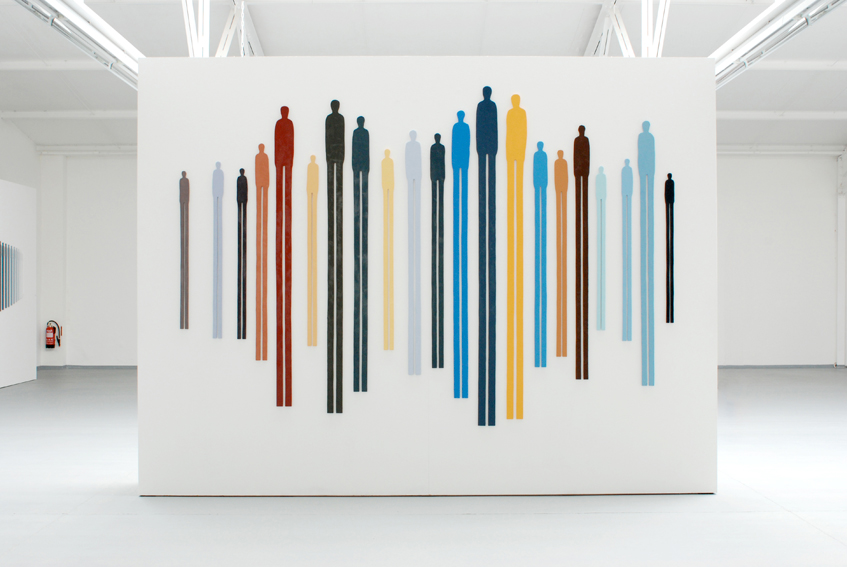 Klassentreffen, Wolfgang Schmidt, Wandobjekt, 21 tlg., ca. 230x350 cm, courtesy arteversum, Düsseldorf